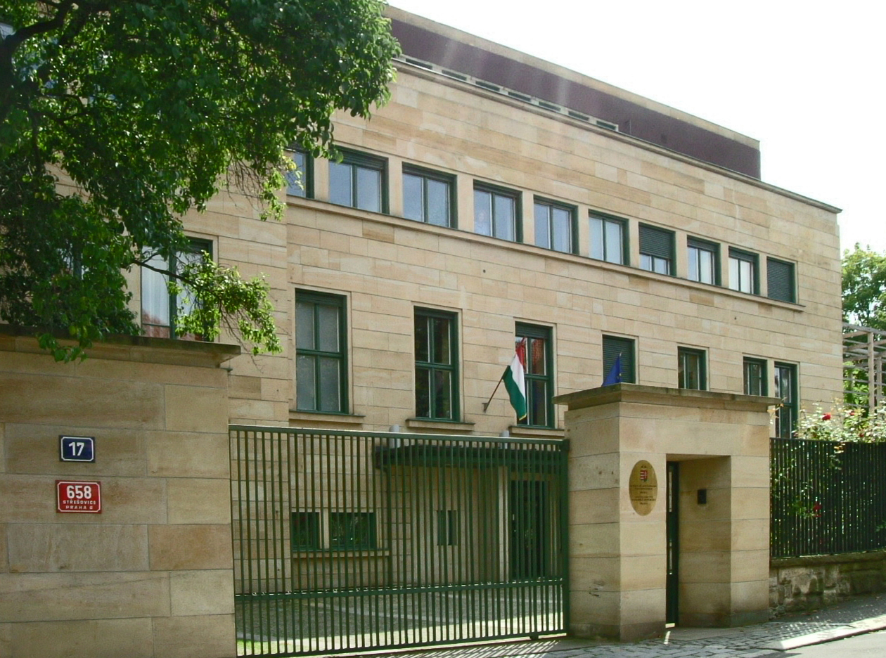 Straßenansicht der Villa Traub, August 2008